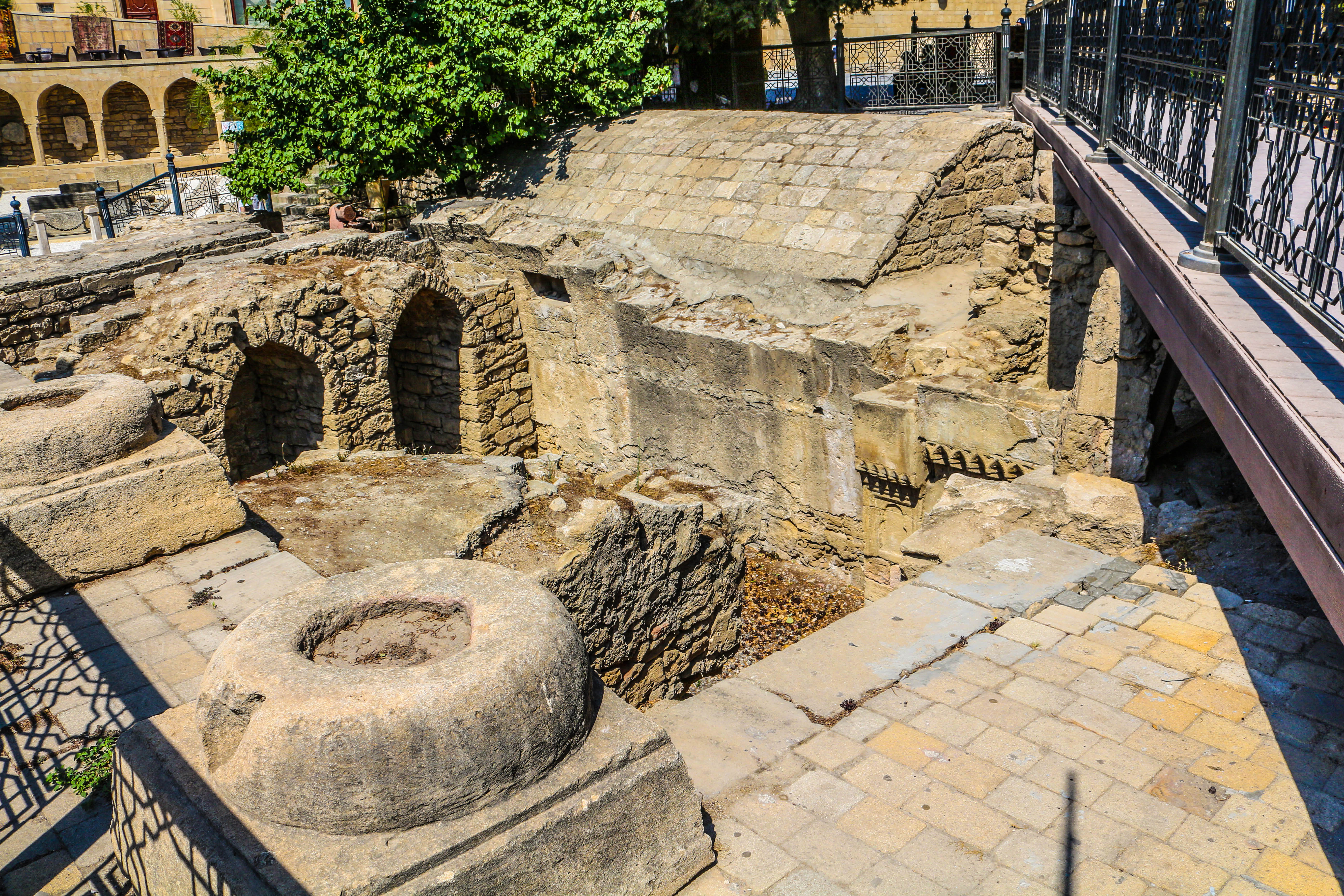 Baba Kuhi Bakuvi məscidi, X—XIV əsrlər